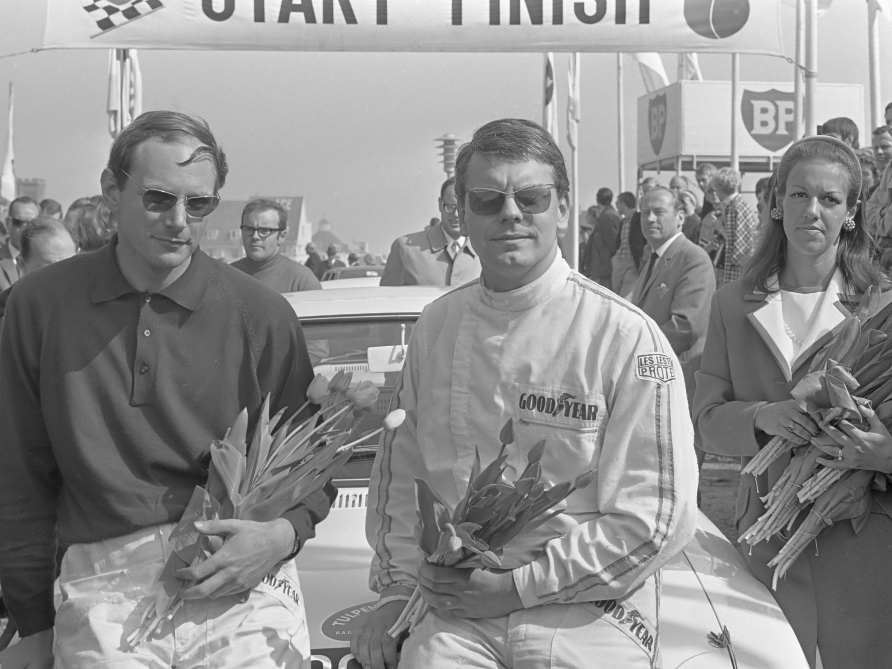 Roger Clark et Jim Porter lors de leurs victoires au Rallye des Tulipes 1968